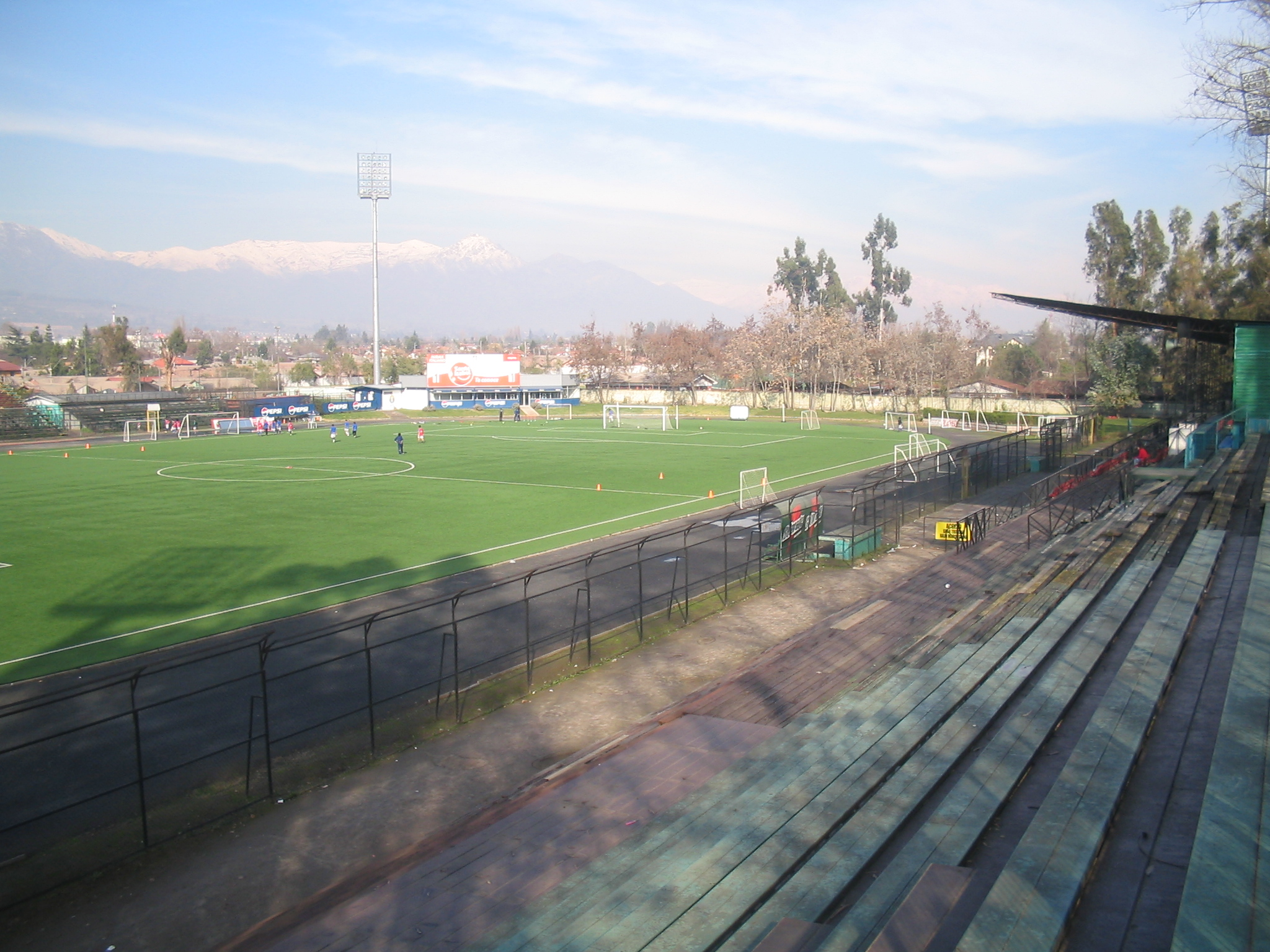 Estadio Municipal de La Florida, La Florida, Santiago de Chile